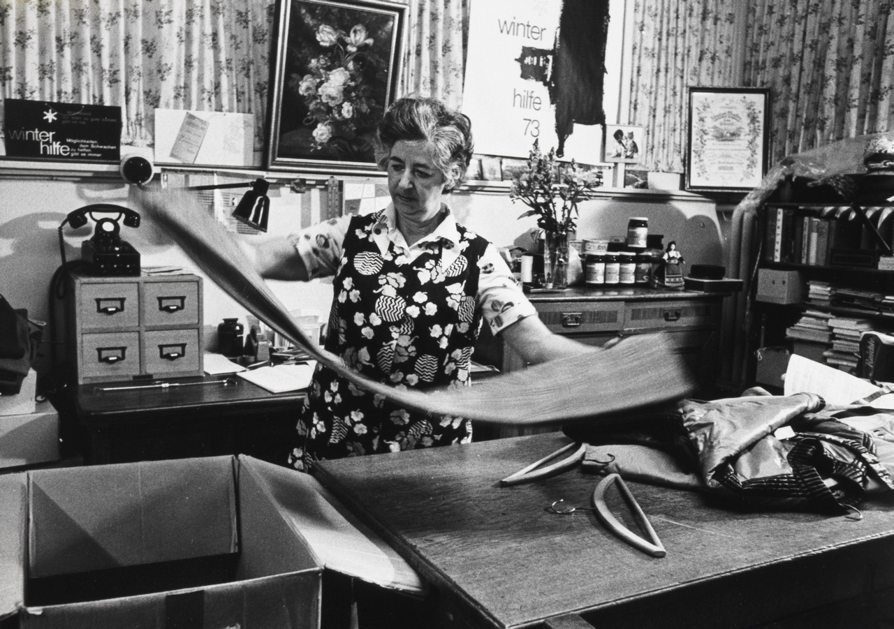 Winterhilfe Schweiz – erste Kleiderstube in Zürich